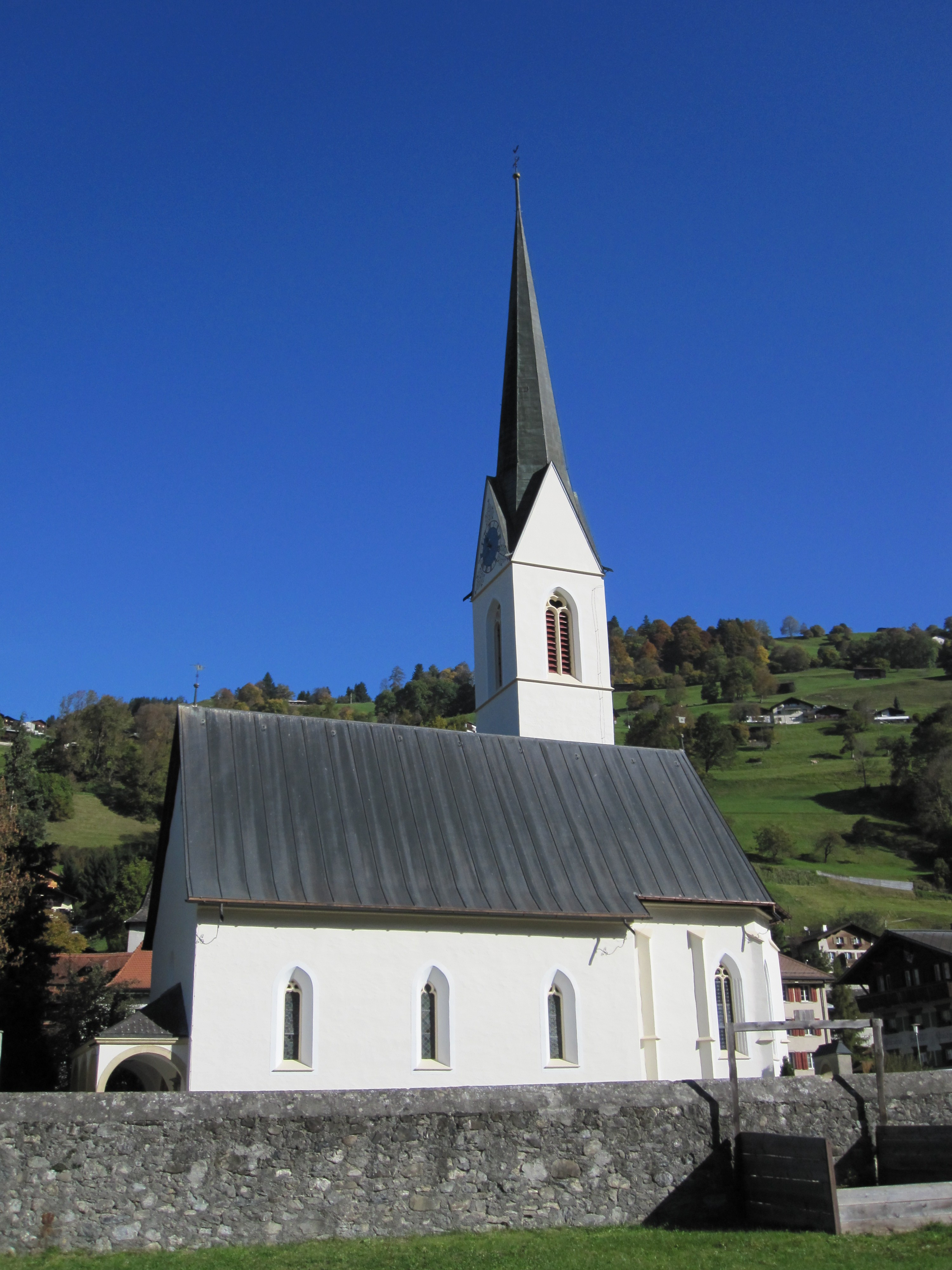 reformierte Kirche Küblis (Kanton Graubünden)